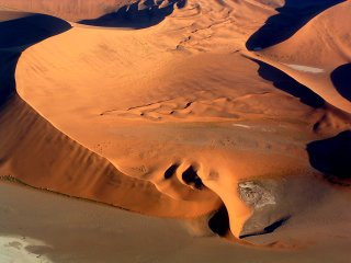 Photo personnelle, Désert du Namib, Namibie, Juillet 2006